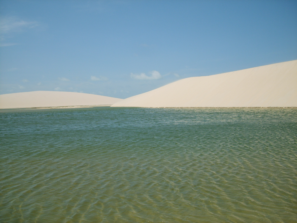 Lagoa entre as dunas de Jericoacoara.